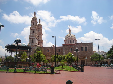 Parroquia colonial de Tepatitlan de 1726